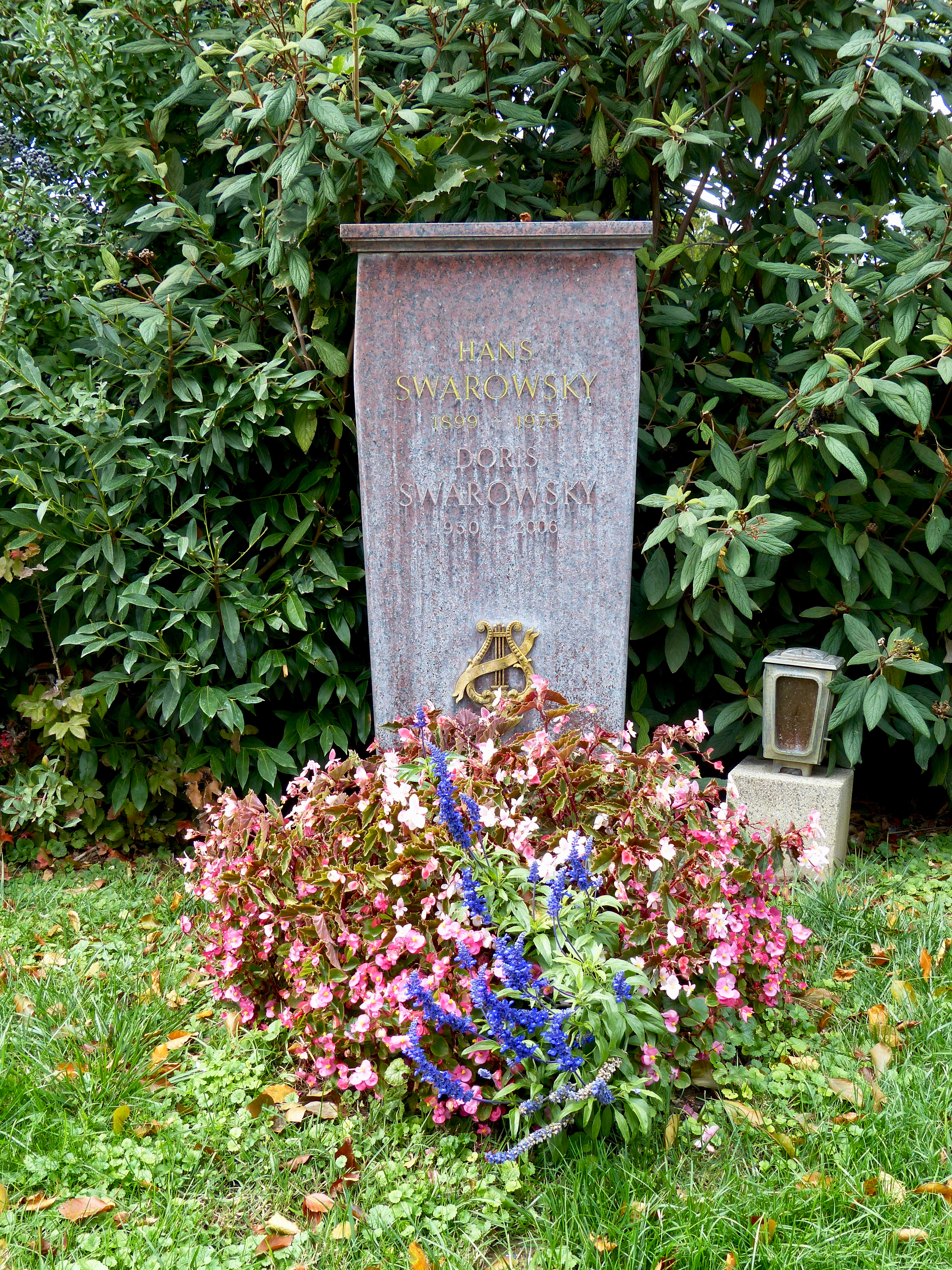 Grabmal von Hans Swarowsky auf dem Wiener Zentralfriedhof